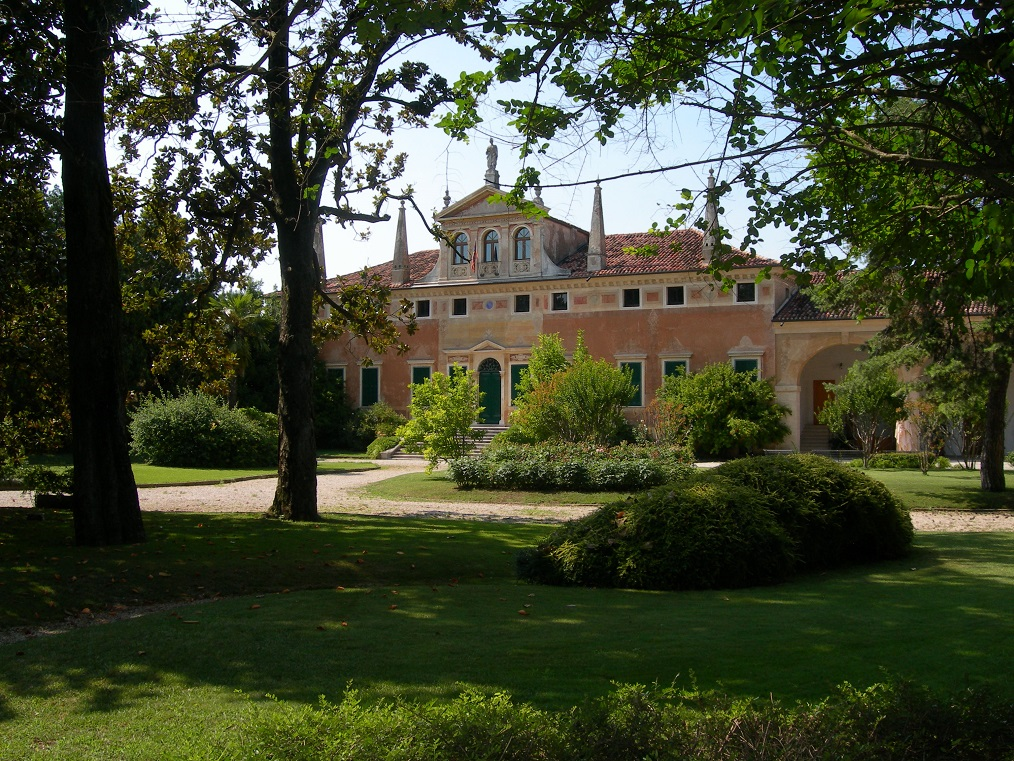 Villa e Parco anteriore